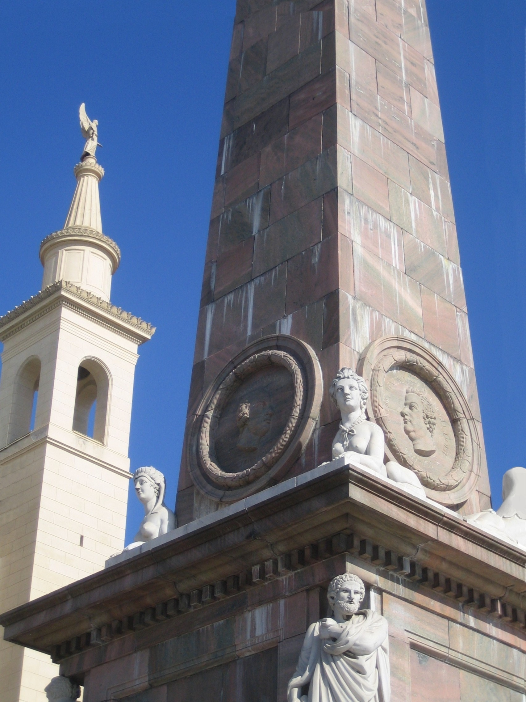 Potsdam, Old Market. The obelisk, details .